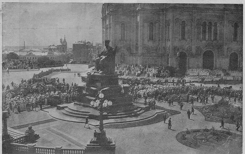 Открытие памятника императору Александру III в Москве у Храма Христа Спасителя. 30 мая 1912 г.